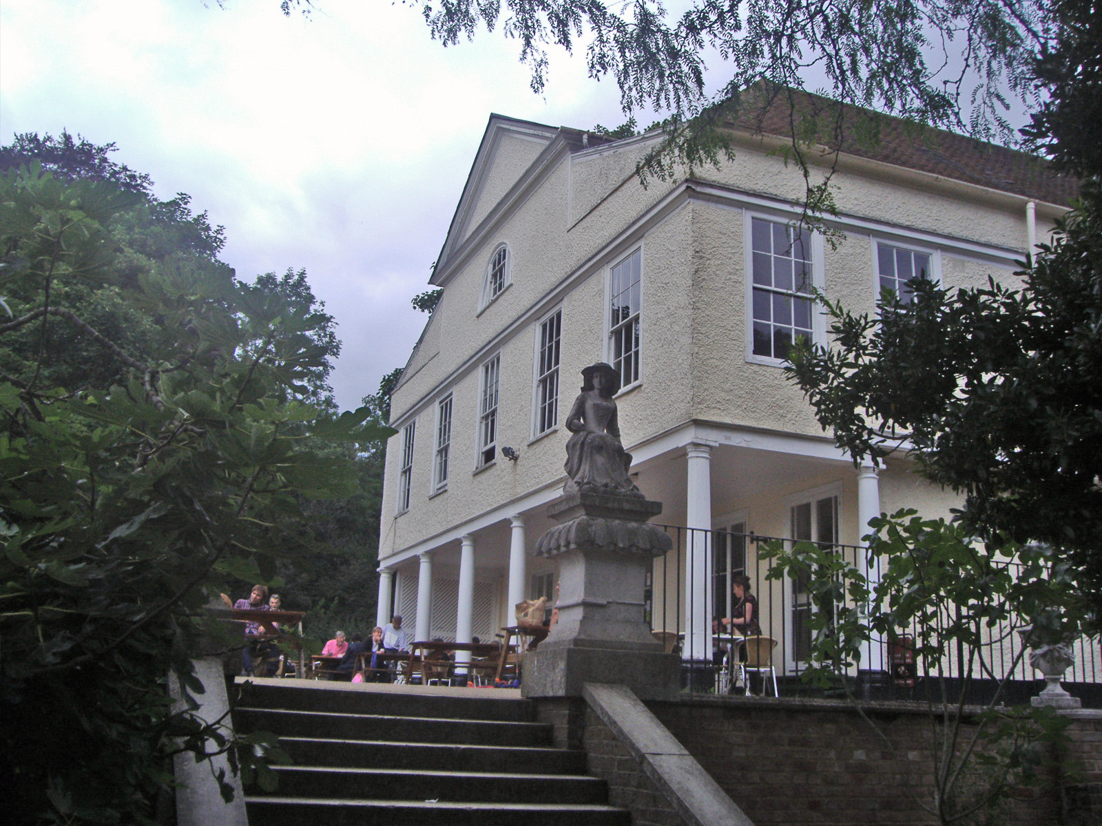 Lauderdale house